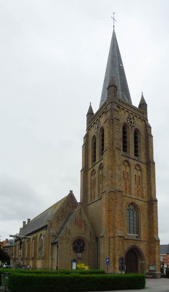 Langemark-Poelkapelle Bikschotestraat zonder nummer